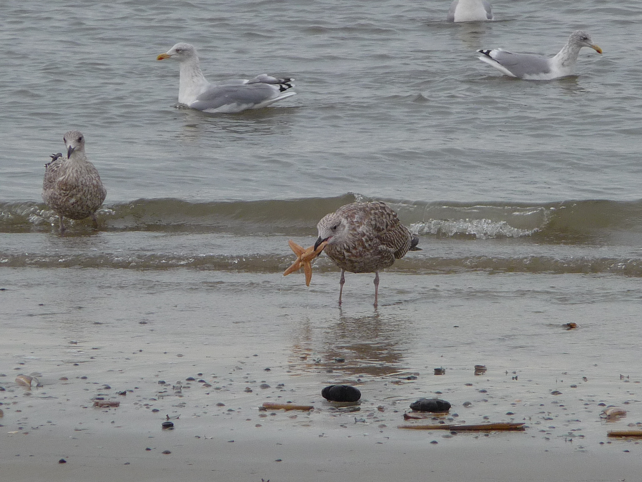 Juvenile Silbermöwe (Larus argentatus) beim Fressen eines Gemeinen Seesterns (Asterias rubens), fotografiert am Strand der ostfriesischen Nordseeinsel Juist (Niedersachsen, Deutschland)